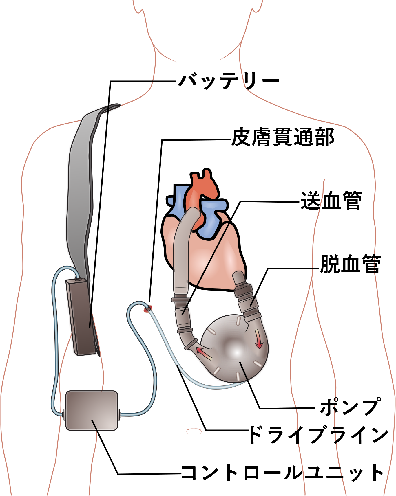 植込型補助人工心臓